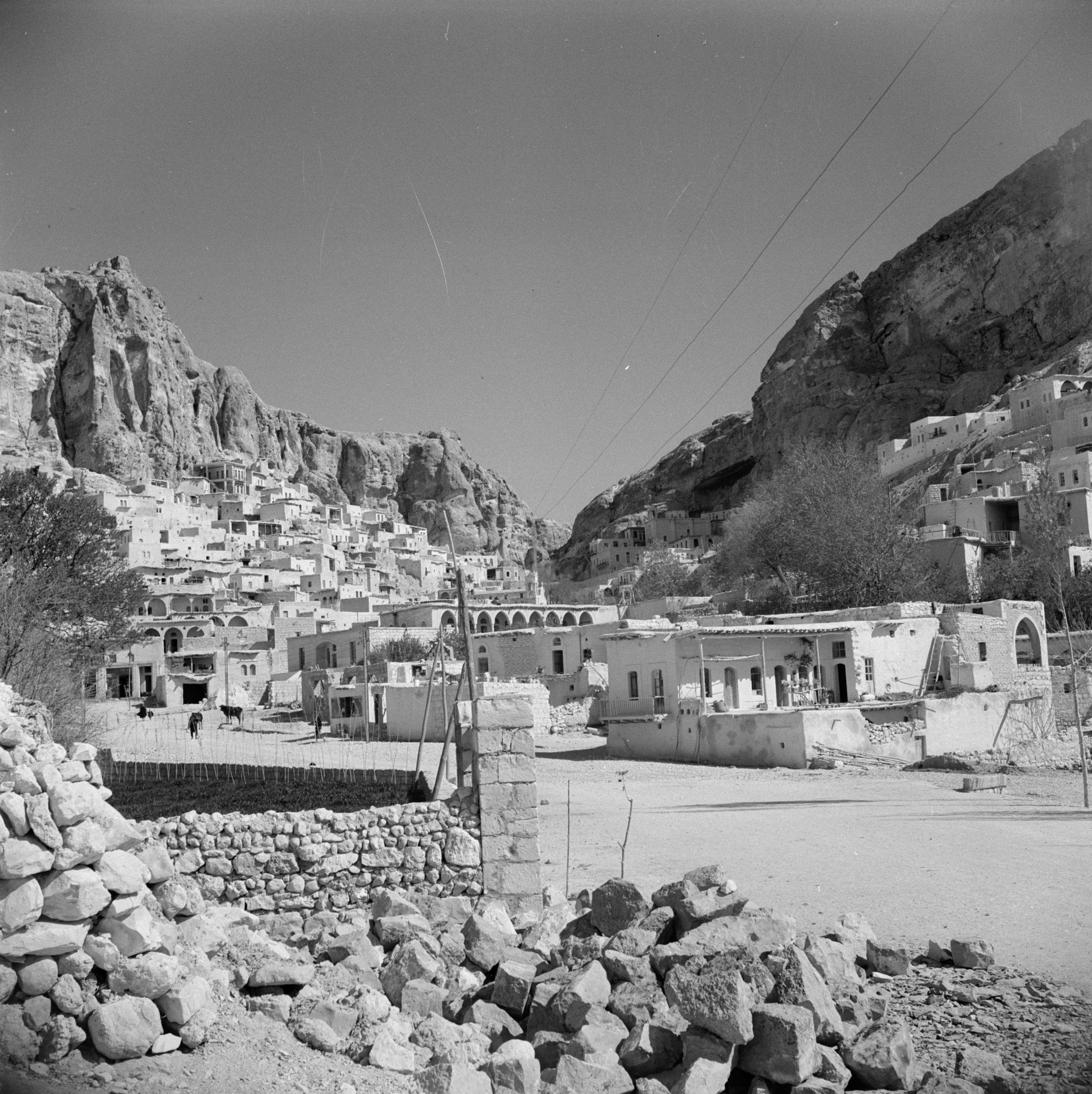 Collectie / Archief : Fotocollectie Van de Poll Reportage / Serie : Midden-Oosten 1950-1955: Syrië Beschrijving : Het dorp Malula Datum : 1950 Locatie : Malula, Syrië Trefwoorden : dorpen, panorama Fotograaf : Poll, Willem van de Auteursrechthebbende : Nationaal Archief Materiaalsoort : Negatief (zwart/wit) Nummer archiefinventaris : bekijk toegang 2.24.14.02 Bestanddeelnummer : 255-6045